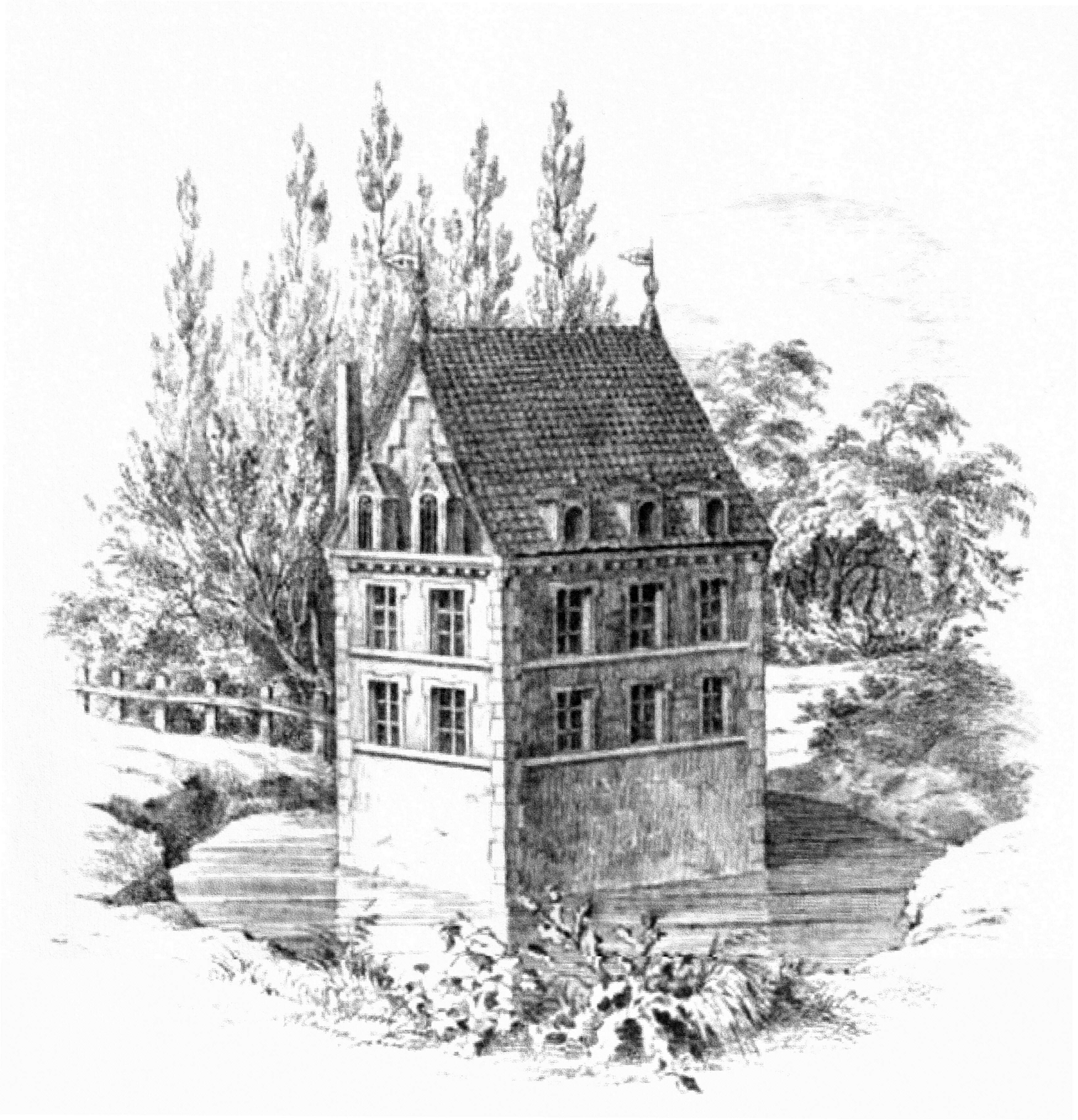 Das ehemalige Gutshaus Schierensee, Zeichnung von Köhler und Roisternitz 1862